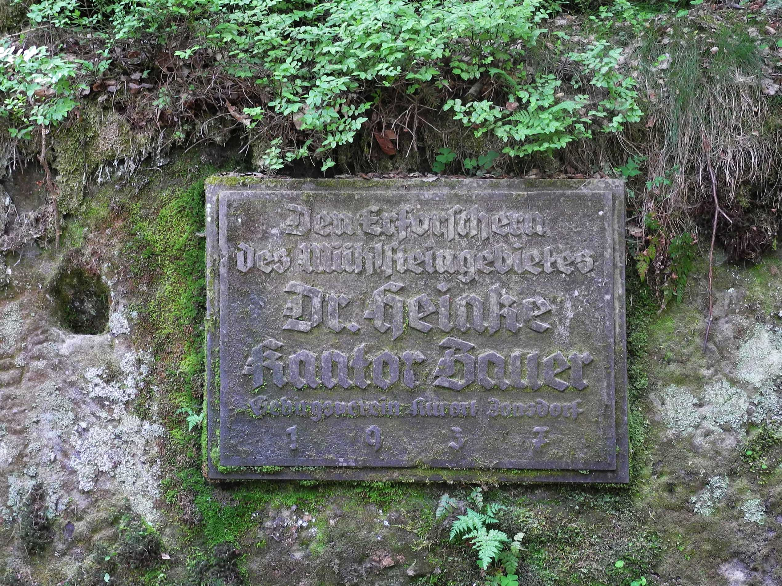 Gedenktafel (1937) für Dr. Curt Heinke und den Jonsdorfer Kantor Reinhold Bauer am ehem. Mühlsteinbruch bei Jonsdorf im Zittauer Gebirge